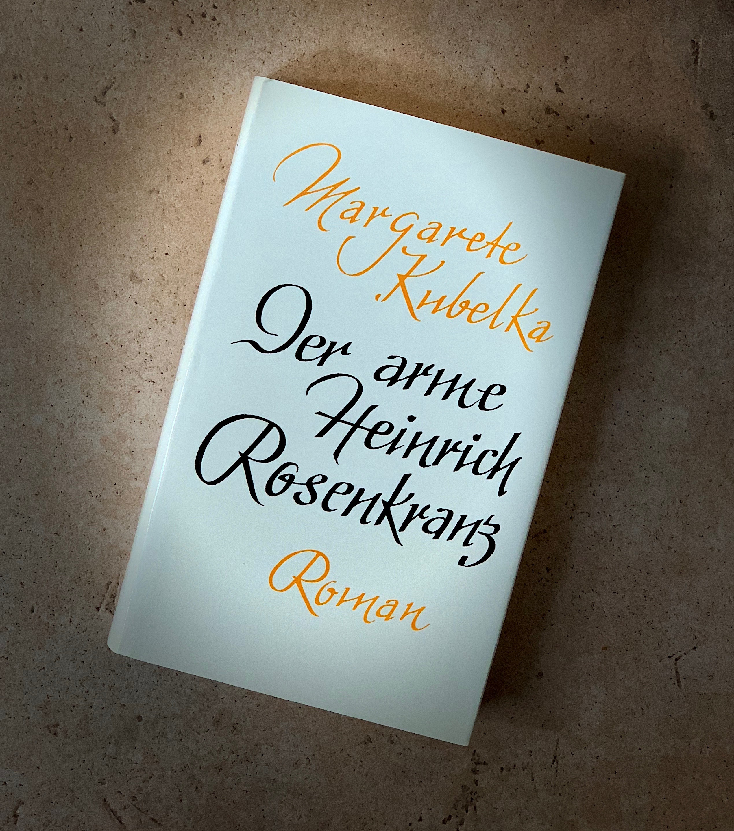 Der Roman - Der arme Heinrich Rosenkranz, Erstausgabe (1964), Maximilian Dietrich Verlag Memmingen